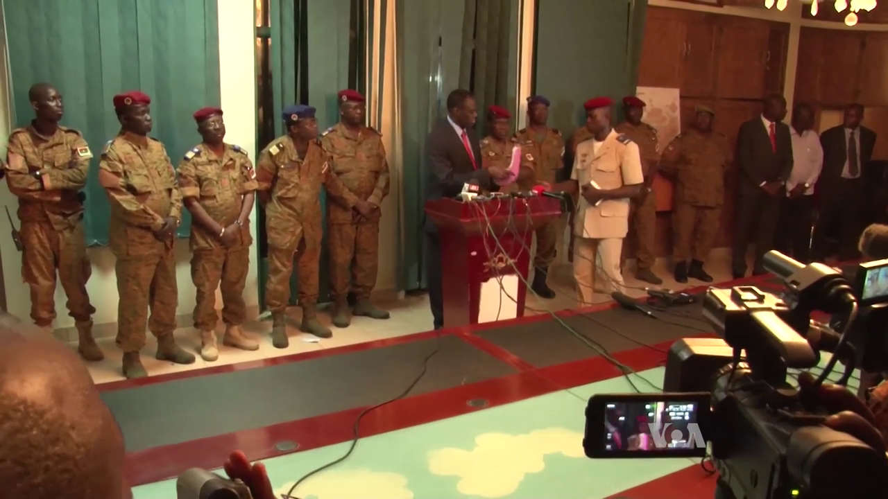 Conférence du président par intérim Michel Kafando après l'échec du coup d'état de Gilbert Diendere et la reprise du camp de Naaba Koom, le 30 septembre 2015 (voir ici pour la légende [1]).